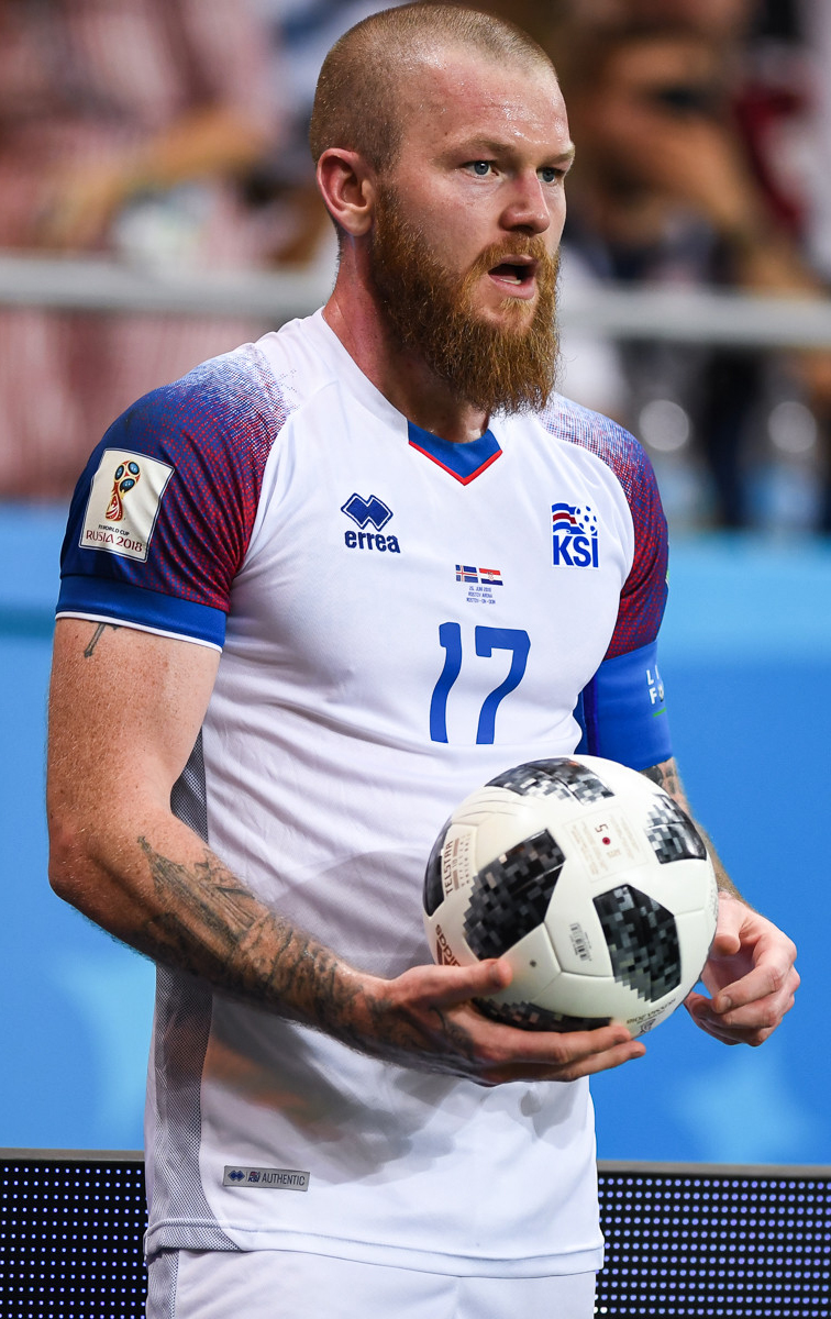 Сборная Исландии уступает Хорватии и покидает ЧМ-2018